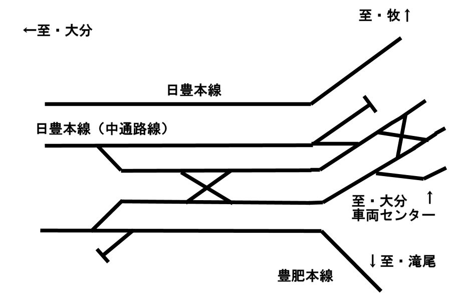 現在の下郡信号場の概略的な配線図。信号機は省略してある。